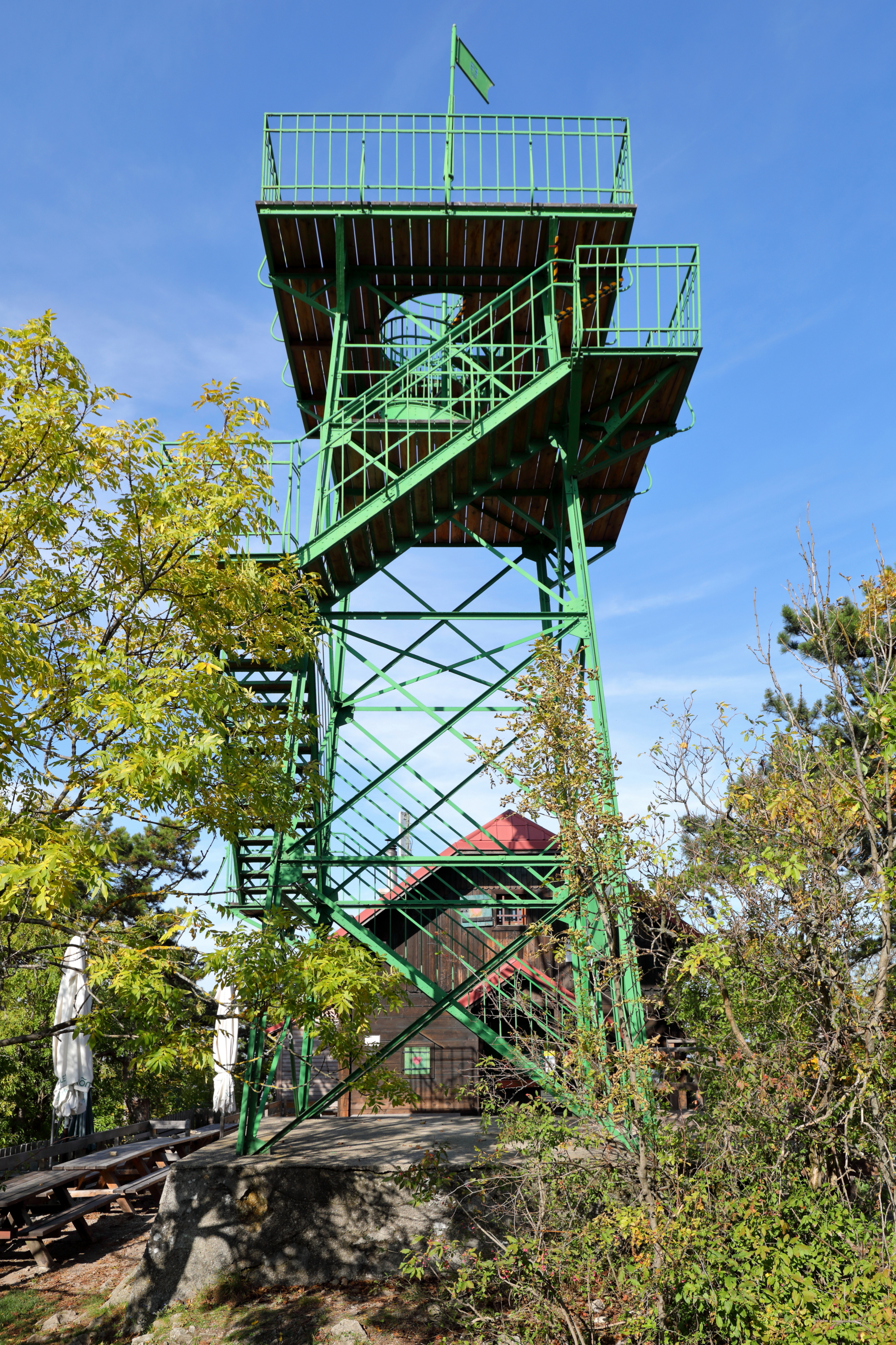 Südansicht der Josefswarte auf dem Gipfel des Hinteren Föhrenberges in der niederösterreichischen Marktgemeinde Perchtoldsdorf. Die zwischen Kaltenleutgeben und Perchtoldsdorf und auf 582 m (lt. BEV) gelegene Aussichtswarte wurde 1891 erbaut. 1912 wurde unmittelbar neben der rund 11 m hohen Aussichtswarte die Kammersteinerhütte errichtet.